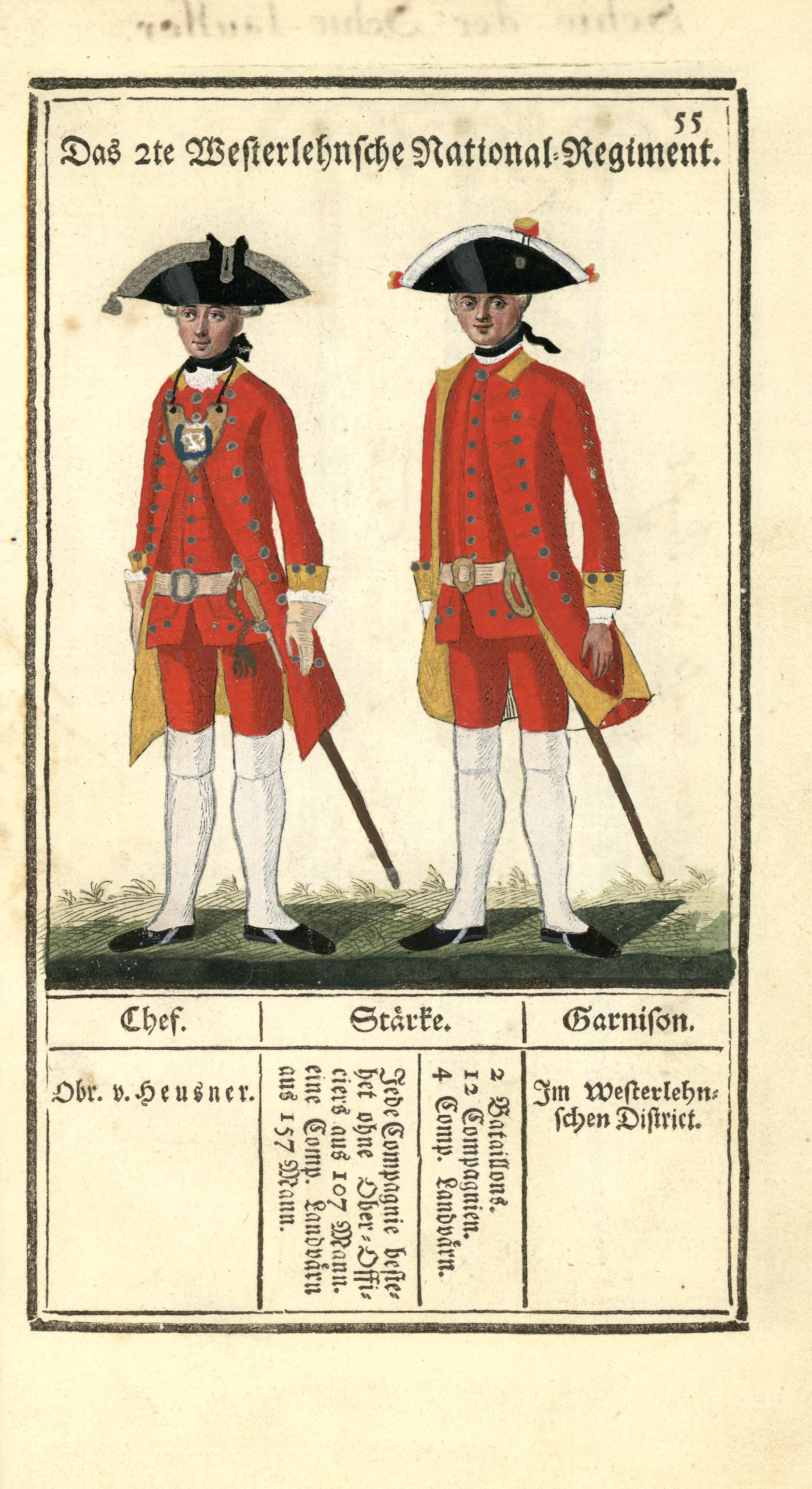 Illustrasjon hentet fra boken "Vorstellung der sämtlichen Königl. Dänischen Armee" av Bertram, Carl og utgitt av Carl Bertram (dk, 1763)